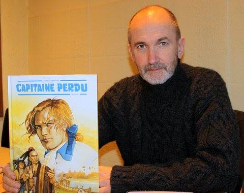 Jacques Terpant, auteur de bandes dessinées